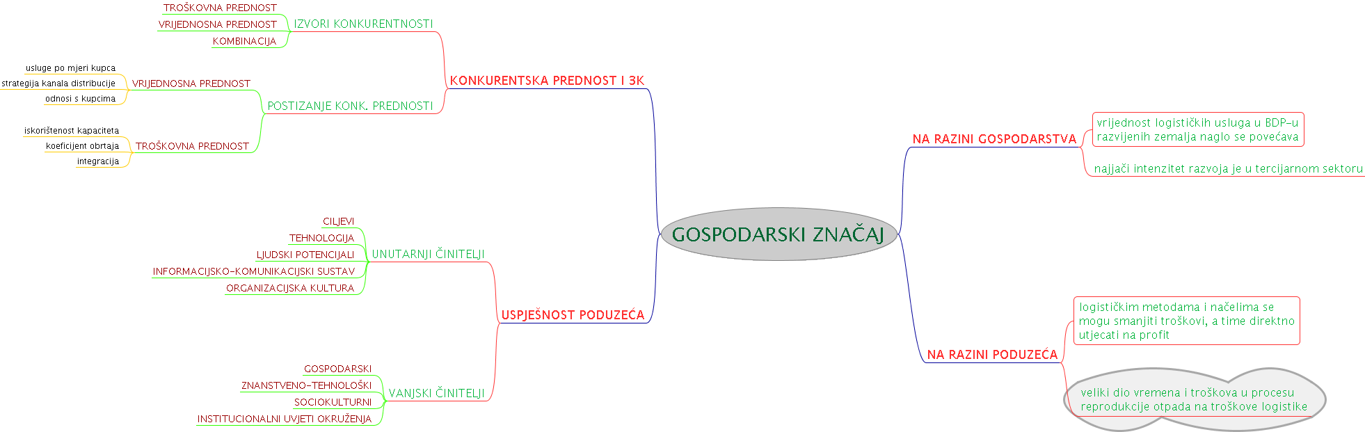 Mentalna mapa - Gospodarski značaj logistike